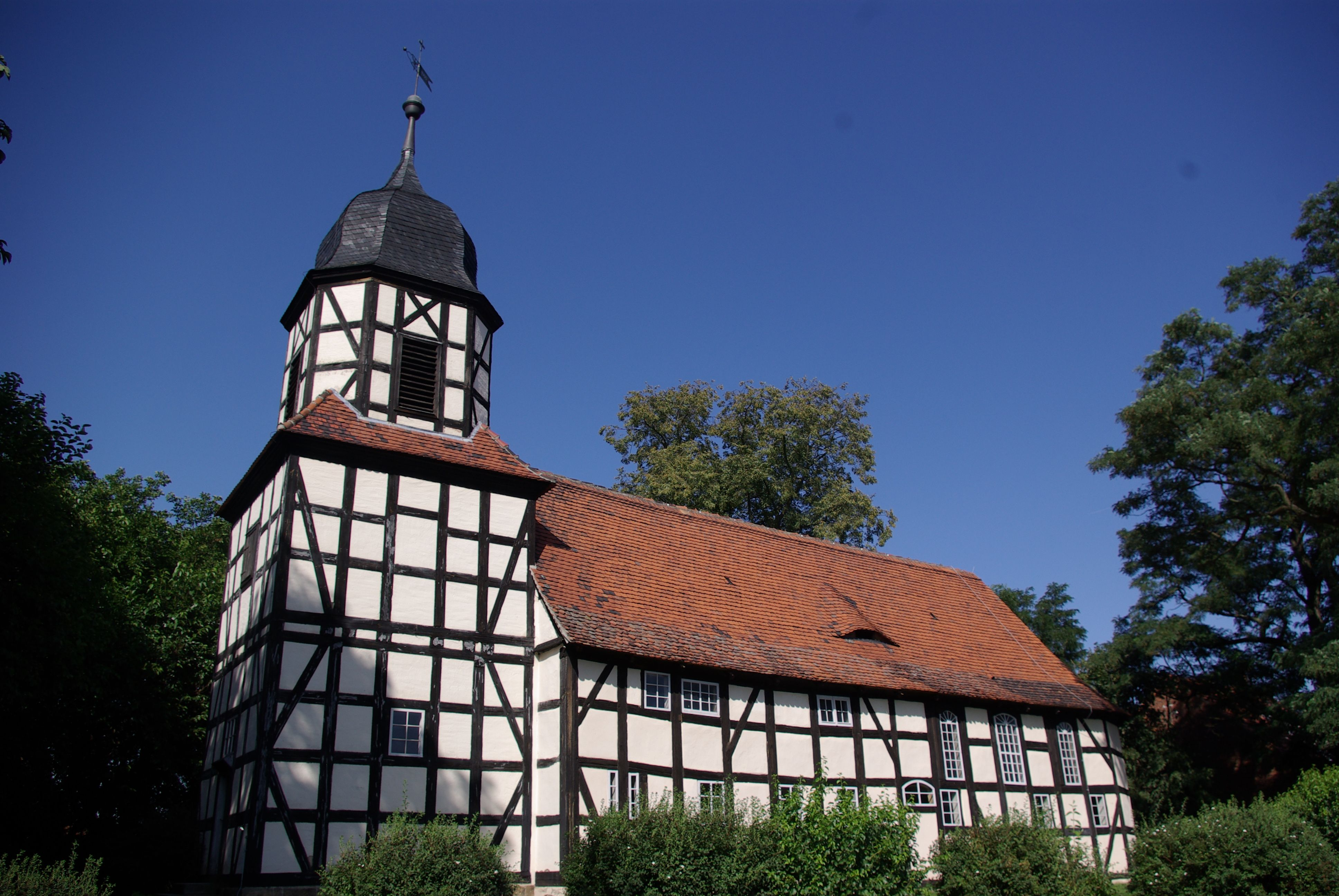 Herzberg/Elster in Brandenburg. Die Kirche im Ortsteil Arnsnesta steht unter Denkmalschutz. Die Kirche wurde im 17. Jahrhundert errichtet.